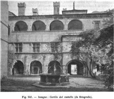 Fotografia di inizio '900 del cortile del castello di Issogne